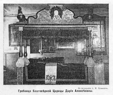 Гробница